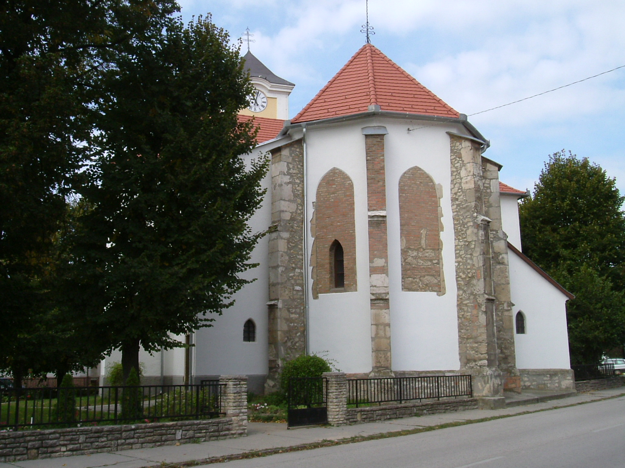 Bajnai Szent Adalbert római katolikus templom szentélye